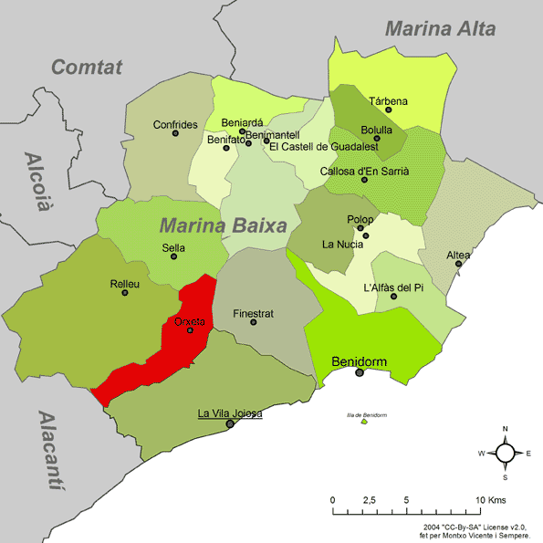 Localització d'Orxeta respecte de la Marina Baixa